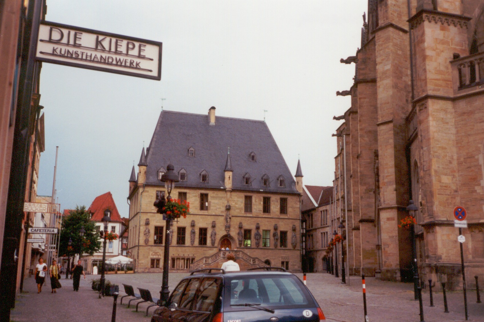 Osnabrück Marktplatz und Rathaus